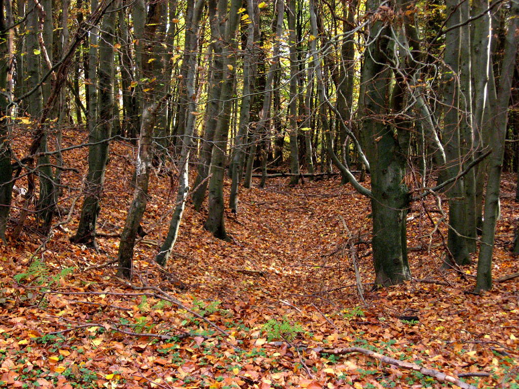 Blick vom Waldweg nach Süden auf den Wall der Erigaburg, in der Mitte ist der Graben zu erkennen